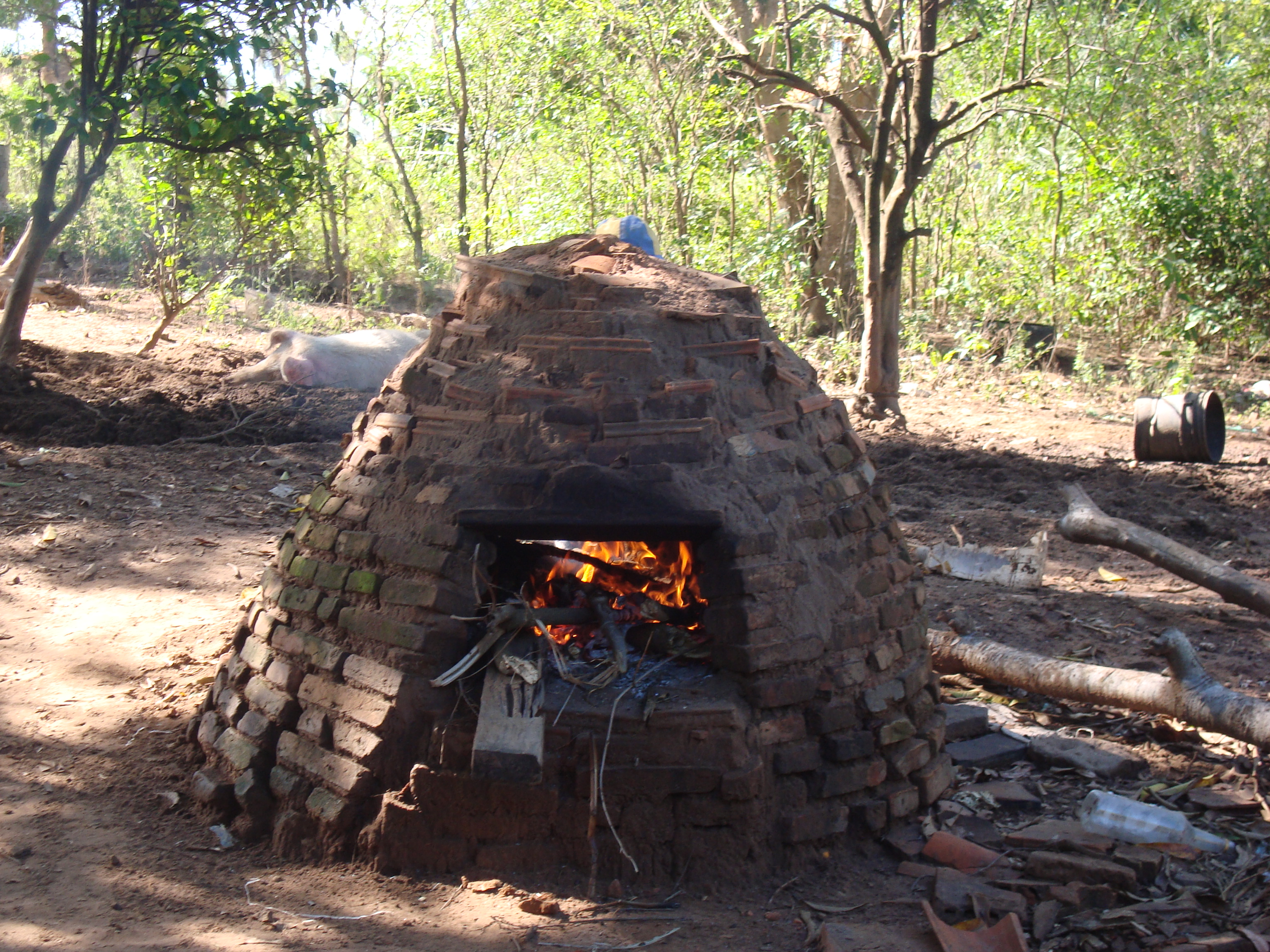 Horno tradicional paraguayo, hecho de ladrillos cocidos sellados con una mezcla de tierra colorada y miel de caña. Se encuentra en la compañia 21 de Julio en Tobati (Paraguay).